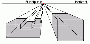 Die 1-Fluchtpunktperspektive